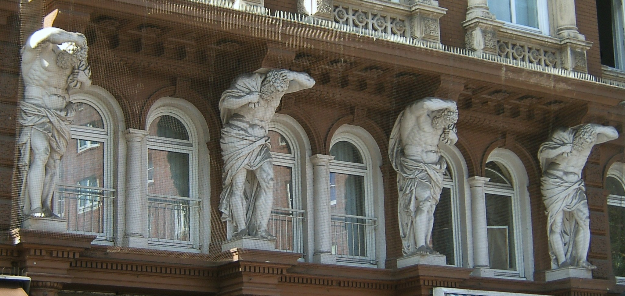 Details eines Hauses in der Langen Reihe in St. Georg. Original description: Bildbeschreibung: Kunst am Bau, Hamburg, St.Georg, Lange Reihe Fotograf eigene Aufnahme Datum: 2004